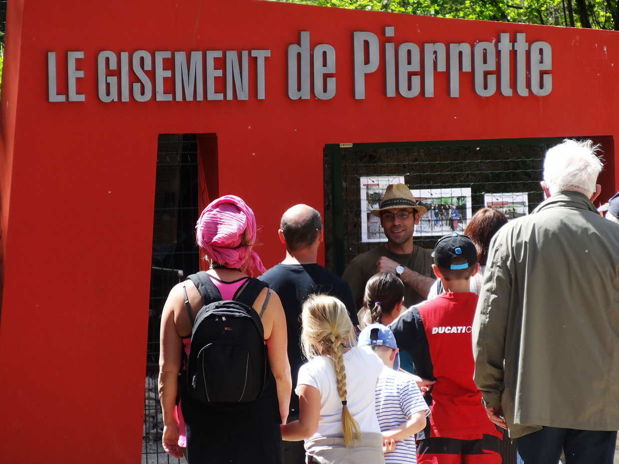 Entrée du gisement archéologique "La Roche à Pierrot", au Paléosite.